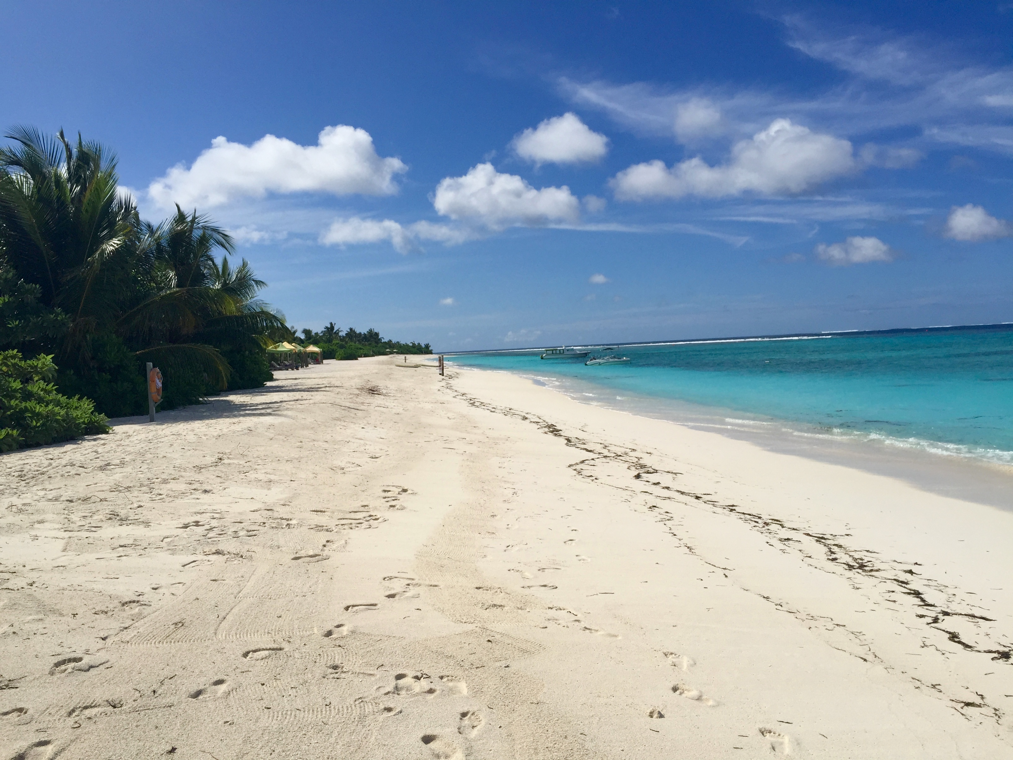 Beach